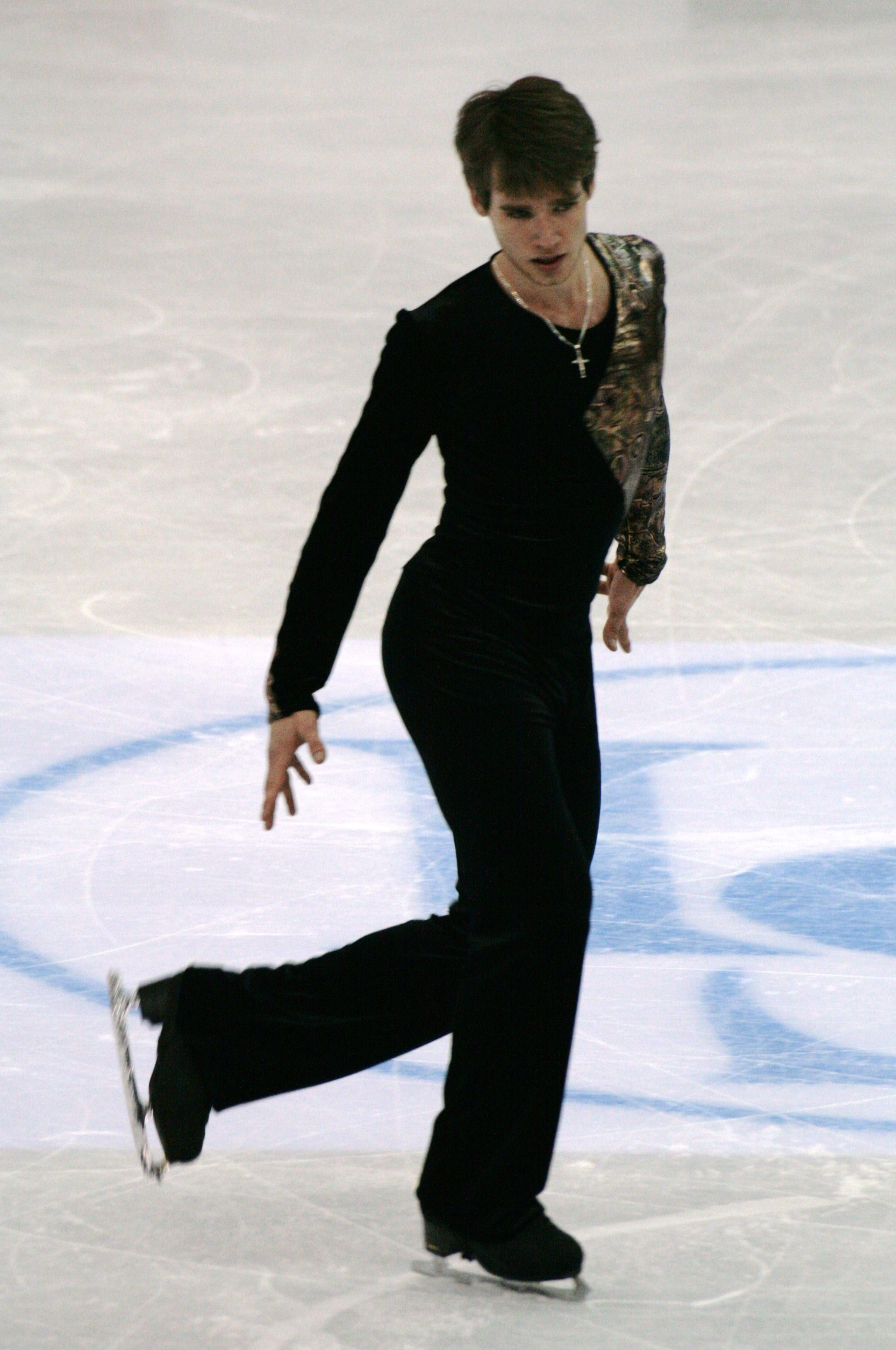 Манол Атанассов (Болгария) на чемпионате мира по фигурному катанию 2012